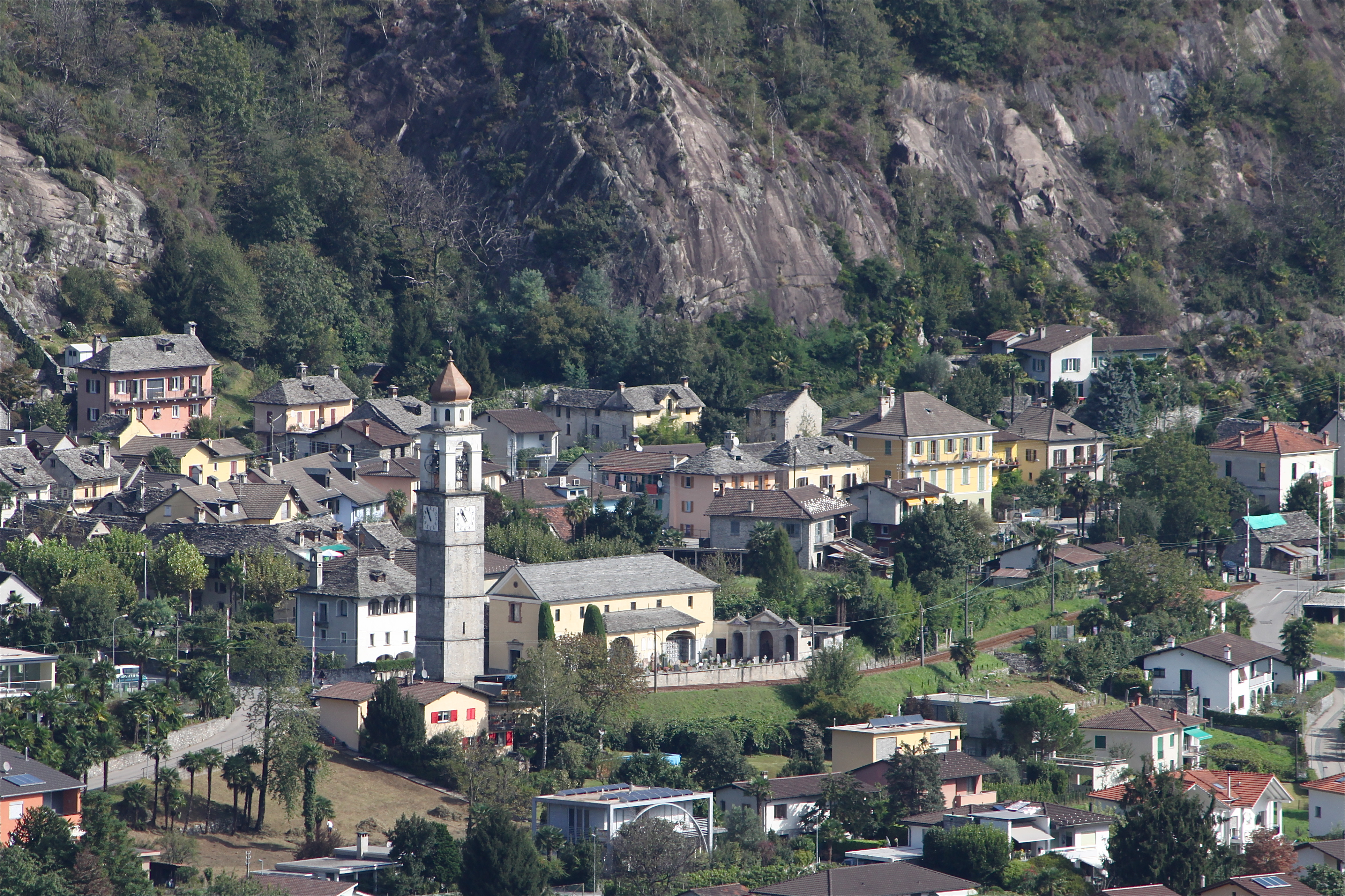 Veduta del Comune di Tegna con la chiesa parrocchiale di S. Maria Assunta.